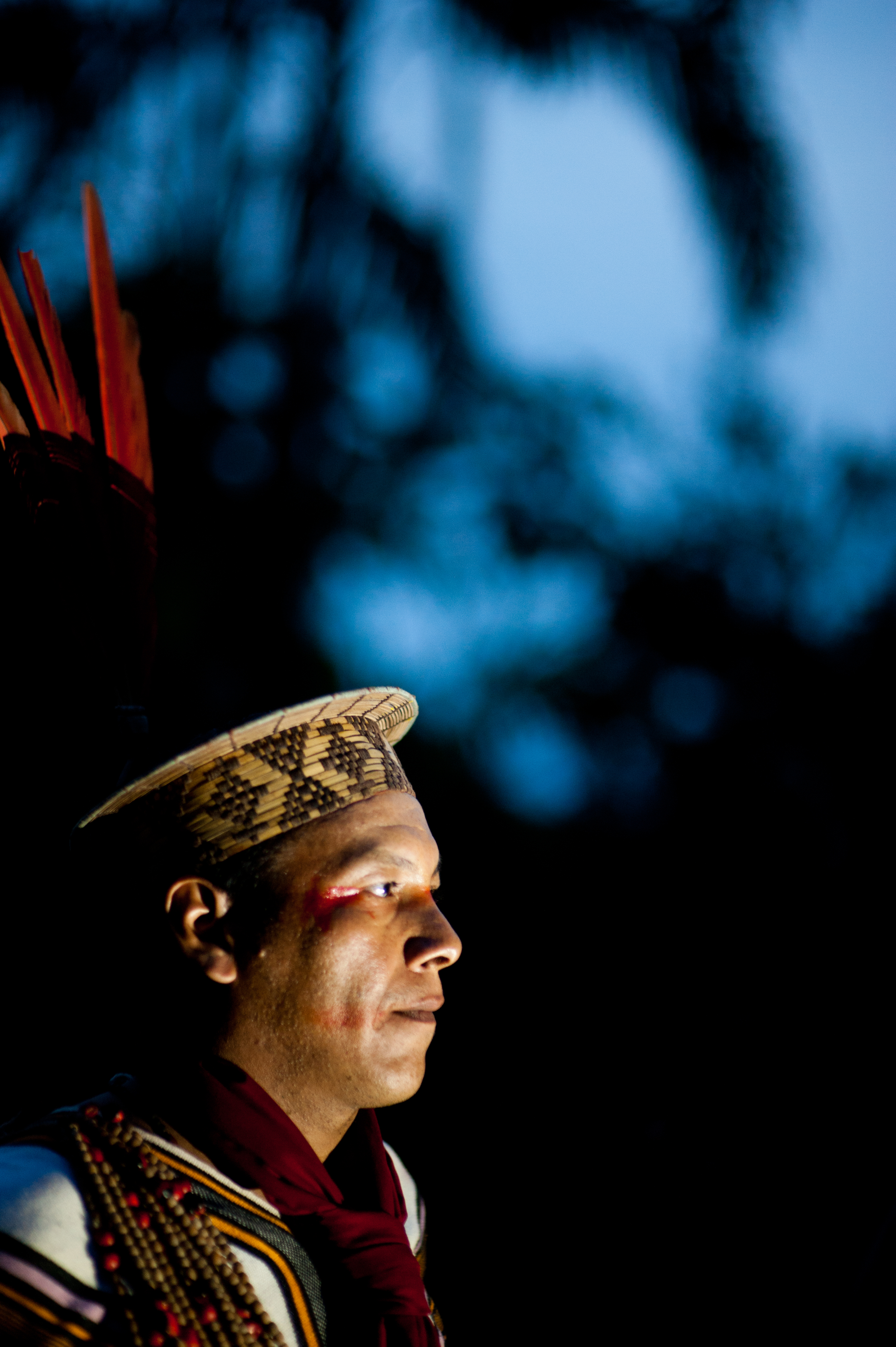 Moisés Pyanko Presidente da Associação dos Apiwtxa Aldeia Apiwtxa Acre, Brasil © Pedro França/MinC